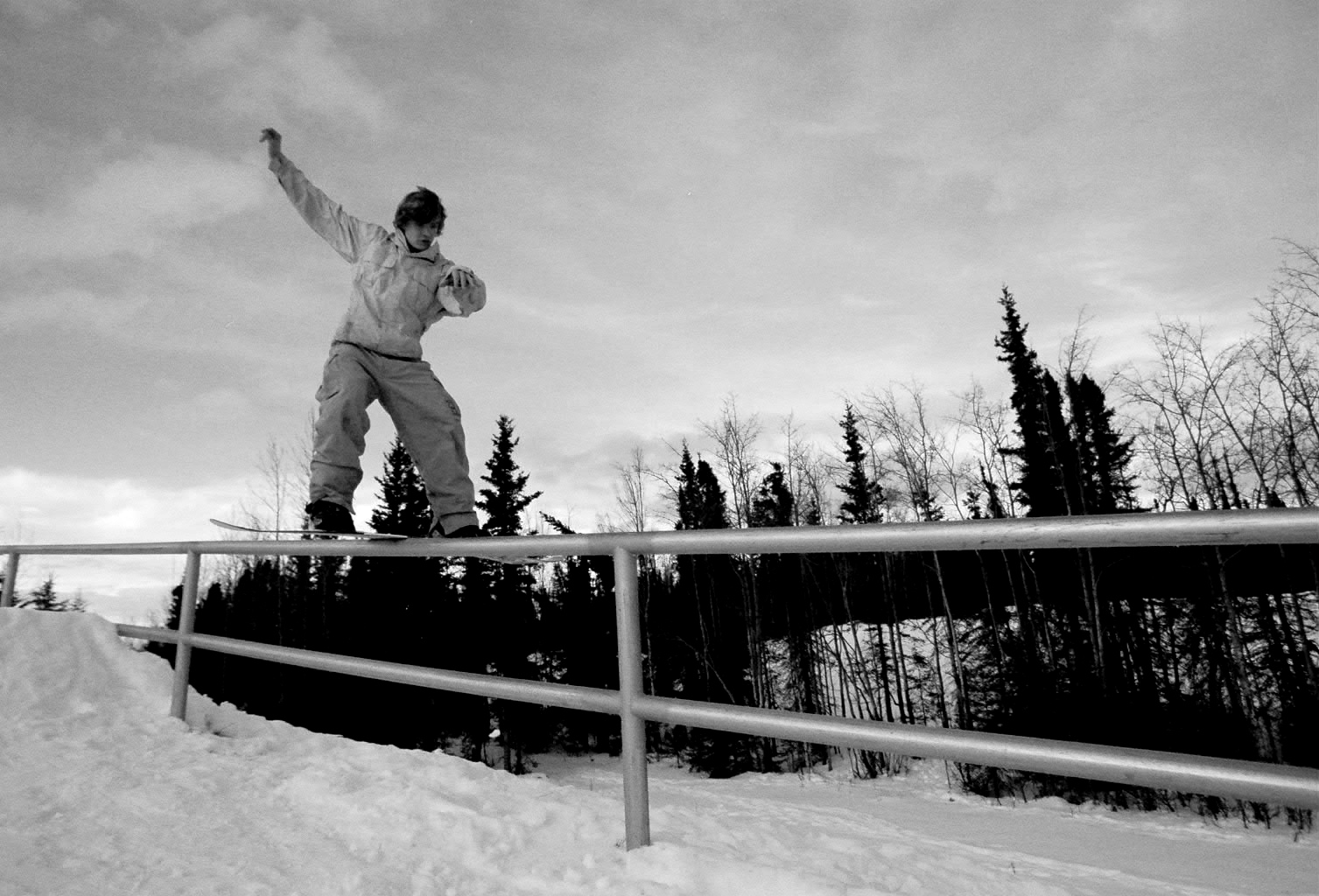 Snowboarding. Backside boardslide.